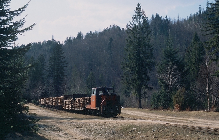 Beladener Produktionszug der Waldbahn Wyhoda bei der Talfahrt zum Sägewerk